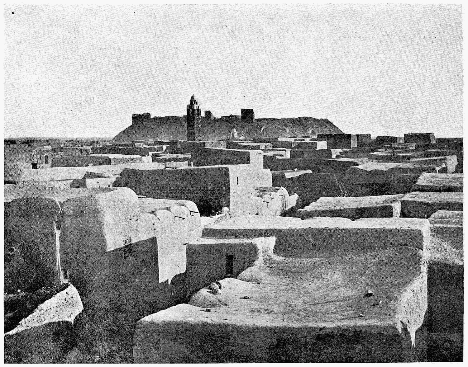 Vue générale de Homs